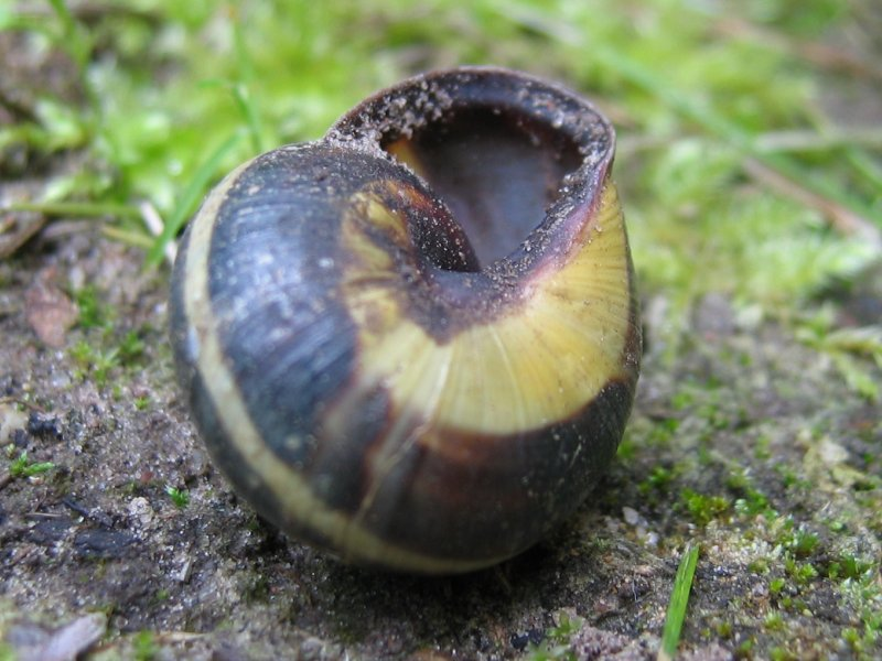 Hain-Bänderschnecke Cepaea nemoralis